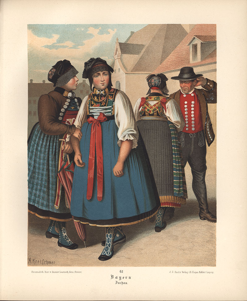 Deutsche Volkstrachten, Original-Zeichnungen mit erklärendem Text